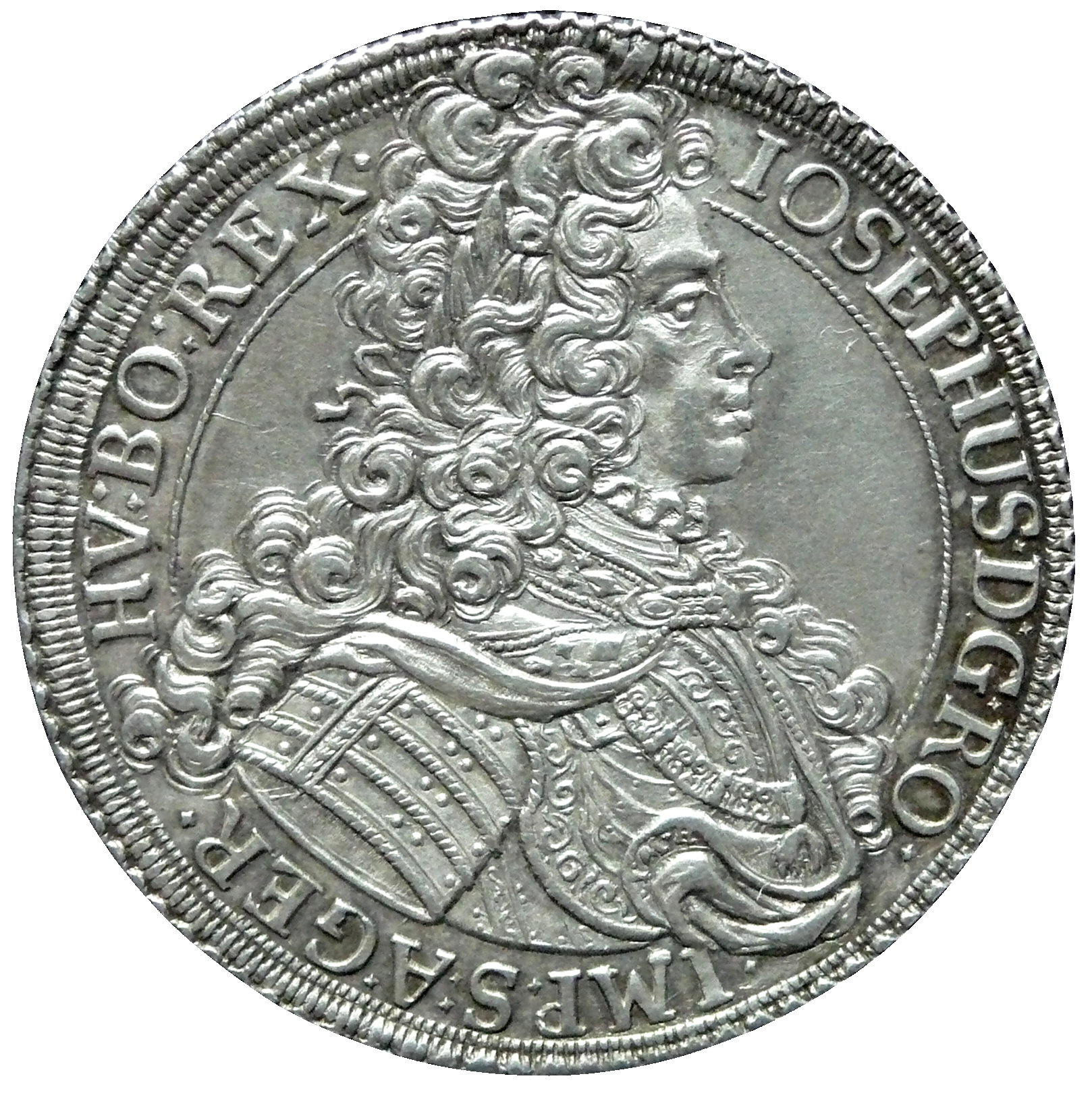 Österreichischer Reichsspeziestaler 1705 Antrittstaler des Kaisers Joseph I. Erzherzogtum Österreich im Heiligen Römischen Reich Deutscher Nation Vom Reichsmünzfuß abweichende Prägung 8,11 Stück a.d.r. Mark, 9,24 Stück a.d.f. Mark Silber 14 Lot 1 Grän = 878,5‰ Feingewicht: 25,318 g Raugewicht: 28,82 g nach Reichsmünzdeputation von 1623 Prägung 1705-1711 Münzstätte Wien Münzmeister Matthias Mittermayer von Waffenberg (1679-1708) Münzeisenschneider Johann Michael Hoffmann (1680-1736) Außerkurssetzung nach Einführung des Konventionsmünzfußes 1748 für 1 Taler 10 Groschen Konventionsgeld Gewicht: 28,56 g Durchmesser: 44,26-44,55 mm Dicke: 2,42 mm Gliederkettenrand großes Brustbild des Kaisers mit Allongeperücke im antikem Prunkharnisch mit Kette vom Goldenen Vlies und goldenen Widderfell, in der Falte des umgeworfenen Mantels die Künstlersignatur M.H. Titelumschrift begrenzt von Schnurkreis oben beginnend nach rechts, wiederholt durch Bildnis unterbrochen: IOSEPHUS DEI GRATIA ROMANORUM IMPERATOR SEMPER AUGUSTUS GERMANIAE HUNGARIAE BOHEMIAE REX = Joseph von Gottes Gnaden Römischer Kaiser, zu allen Zeiten Mehrer des Reichs, König in Germanien, Ungarn und Böhmen